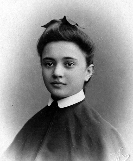 Вера Фёдоровна Шмидт (урождённая Яницкая)